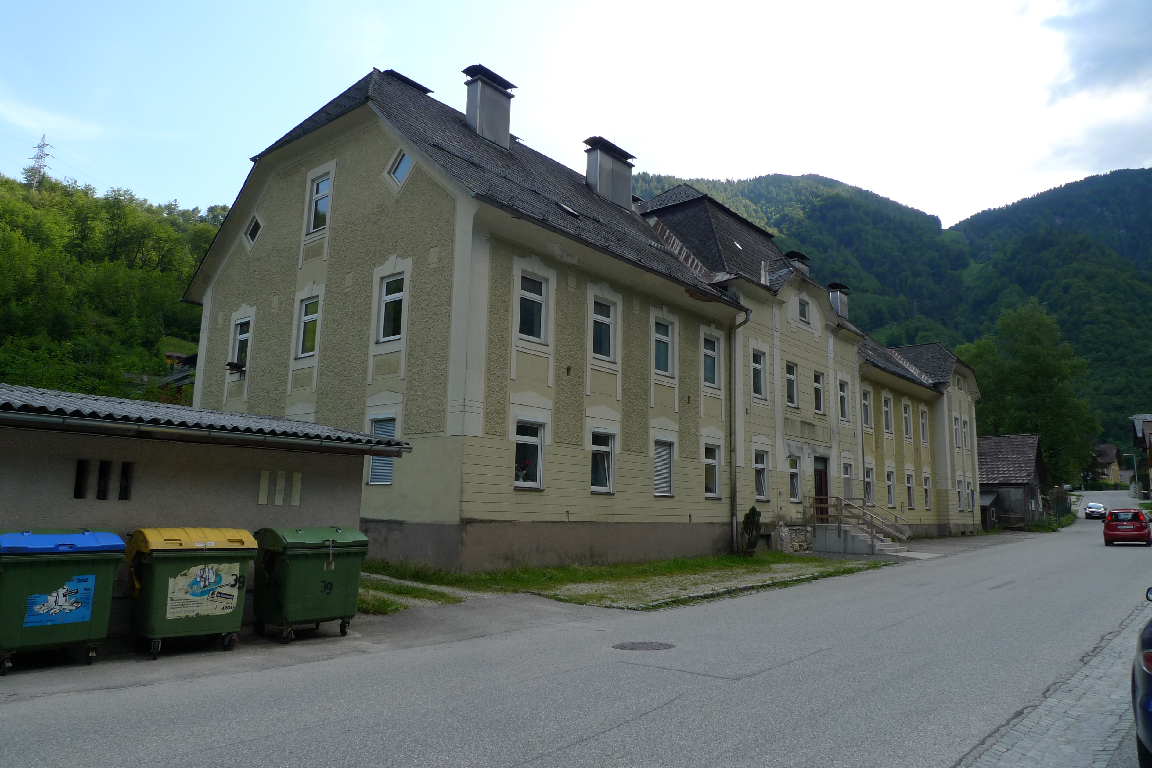 Ehem. Salinenverwaltungsgebäude, Wohnhaus der Gemeinde Ebensee